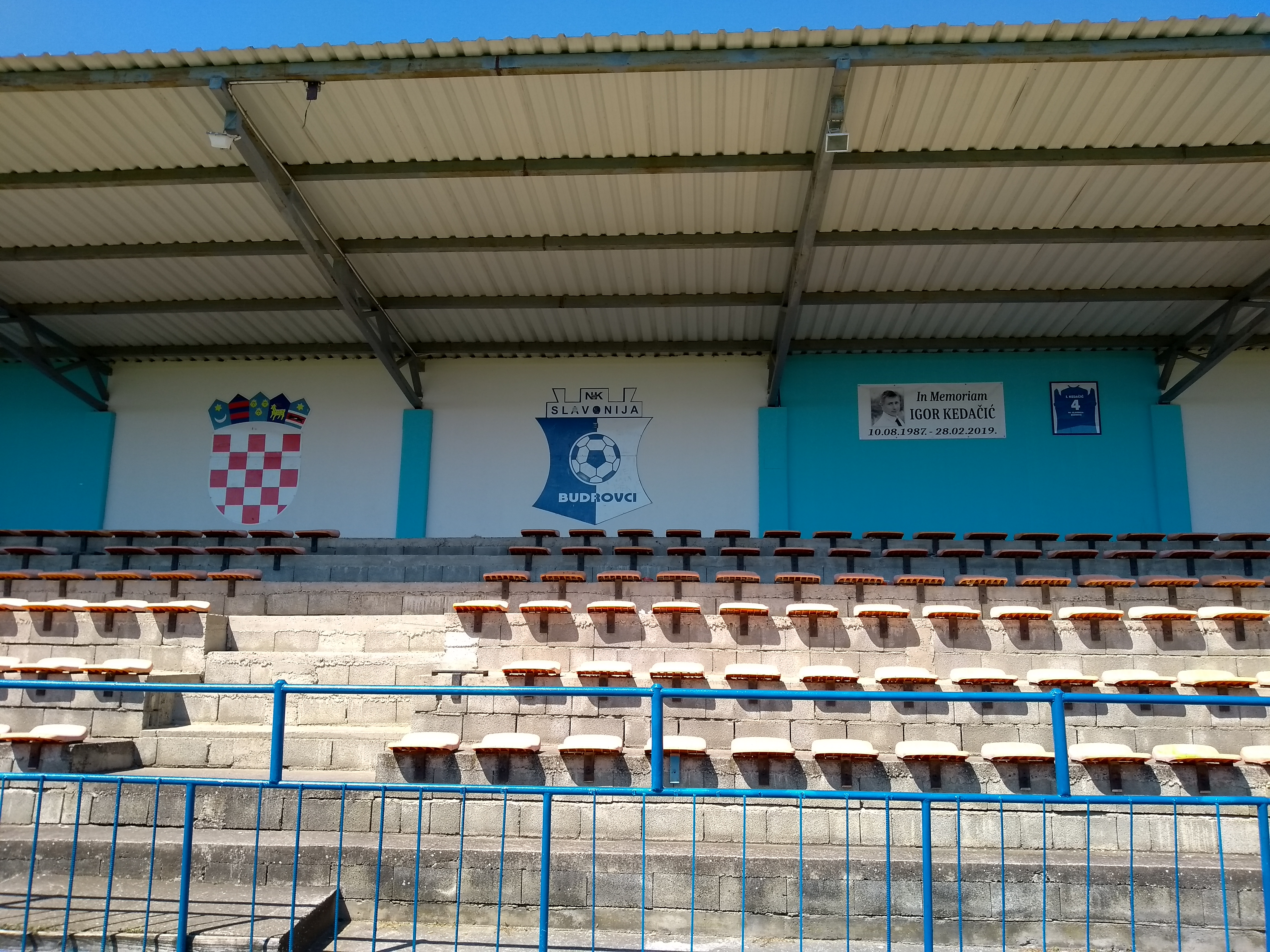 Tribina - NK Slavonija Budrovci